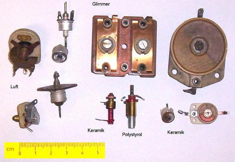 Verschiedene Trimmer: Lufttrimmer, Quetschtrimmer, Rohrtrimmer, Scheibentrimmer (Im Bild angegeben: Dielektrikum)